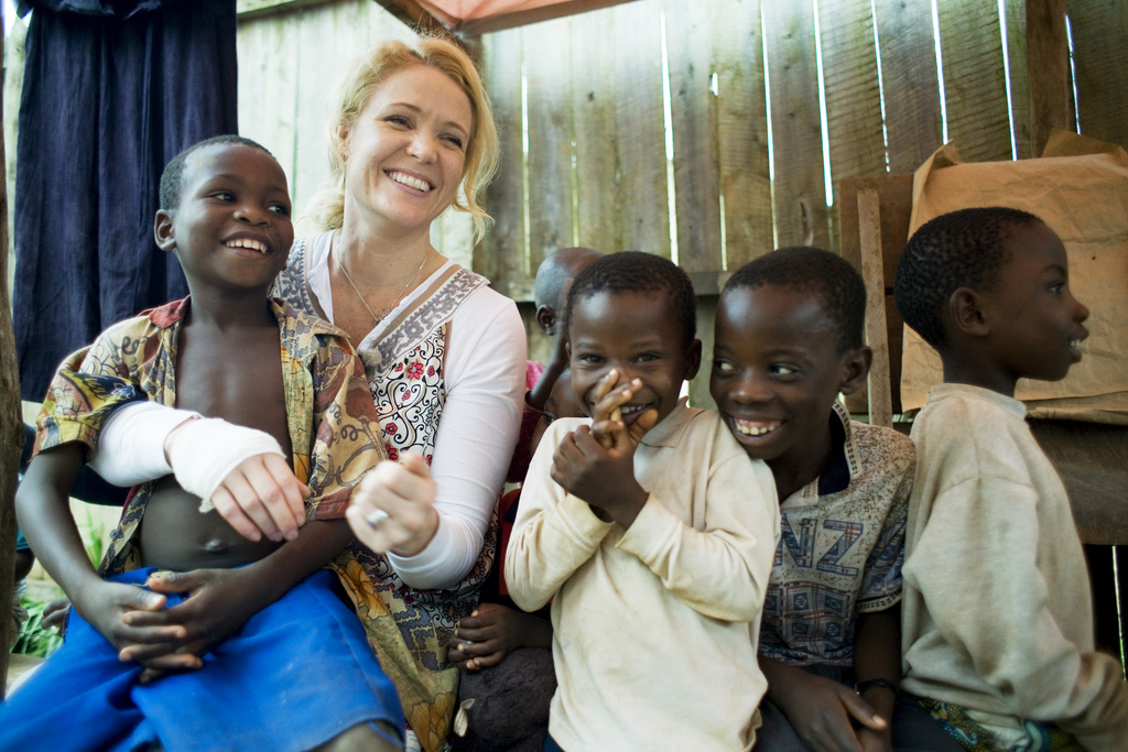 Inför Humorgalan 2008 reste Kattis Ahlström med Unicef till östra Kongo-Kinshasa där hon mötte kvinnor och barn som drabbats av kriget i landet. Foto: Melker Dahlstrand